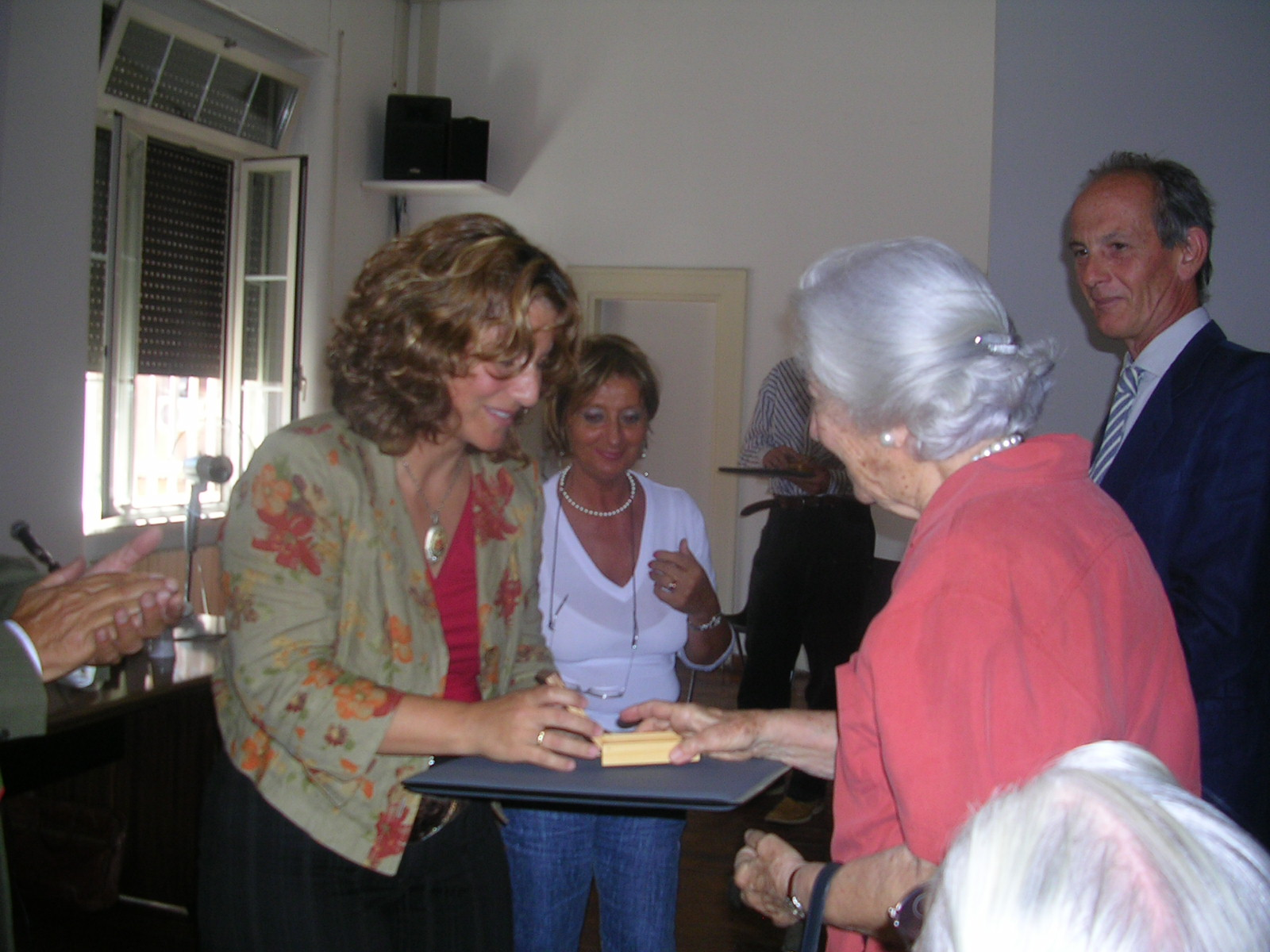 טקס הענקת אות חסיד אומות עולם לזוג נפוליאונה על ידי נציגת קהילת רומא